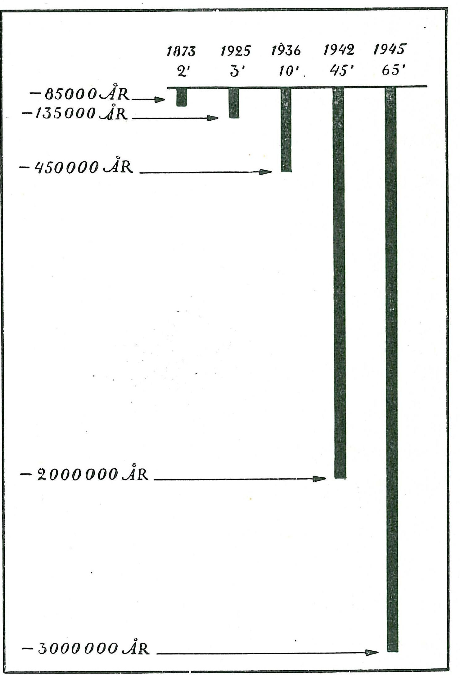 Corer depth